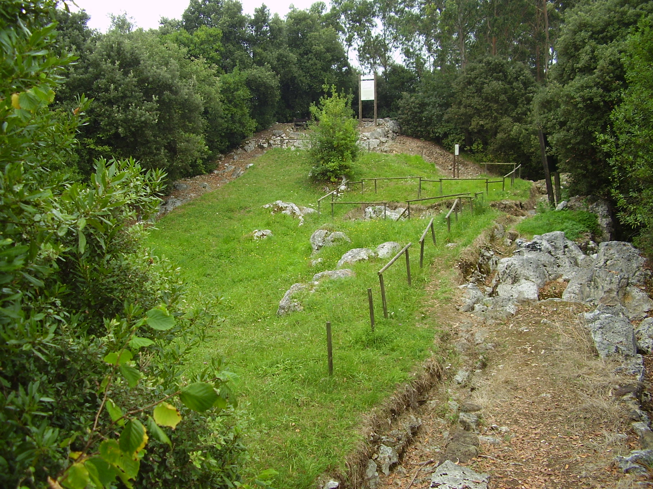 Restos de un antiguo castillo medieval. Las vistas desde esta fortaleza son espectaculares